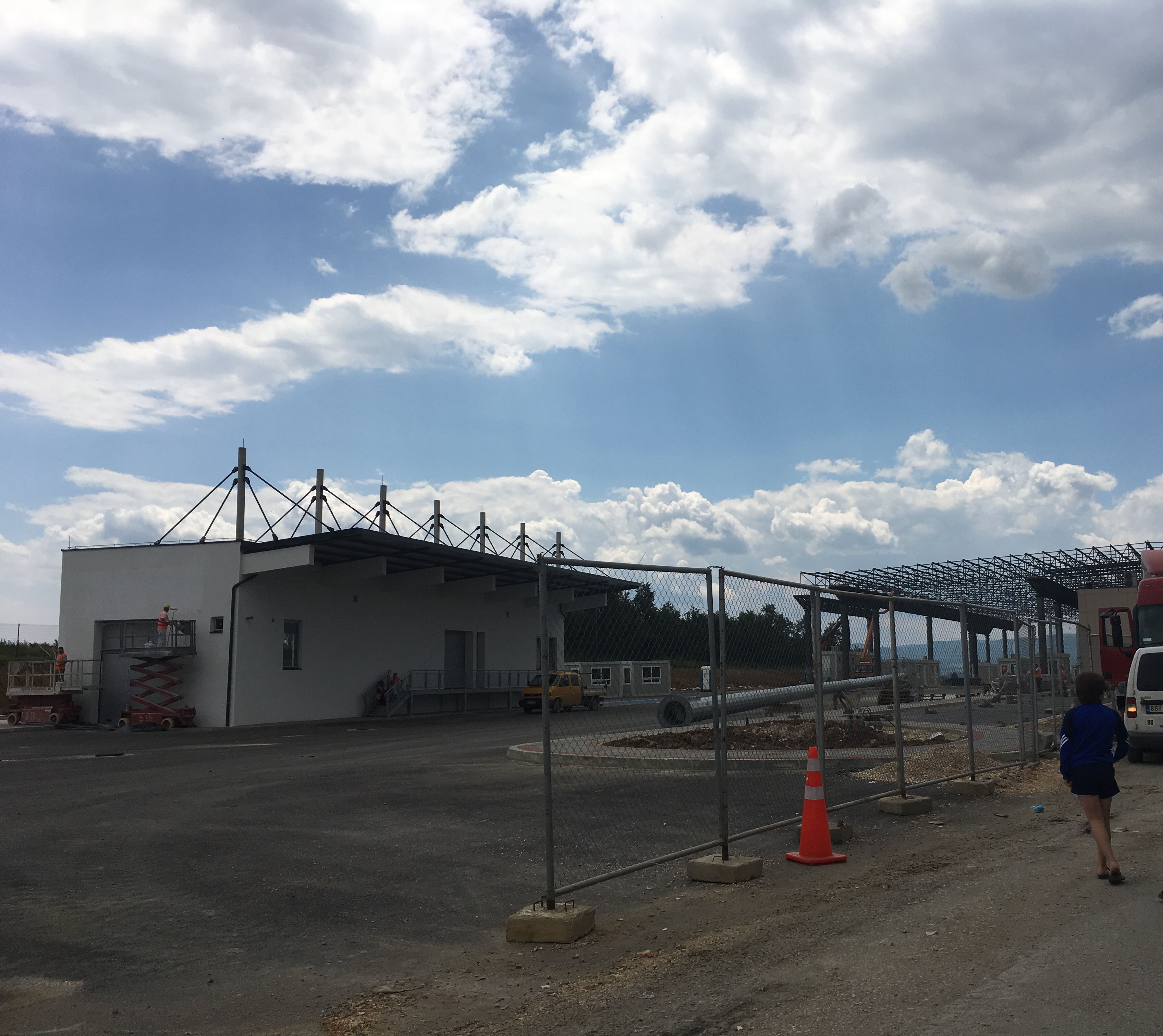 Bauarbeiten an dem Grenzübergang Merdare 18. Juli 2018